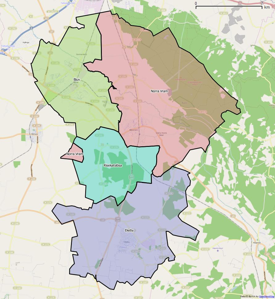 Distriktsindelningen i Bjuvs kommun